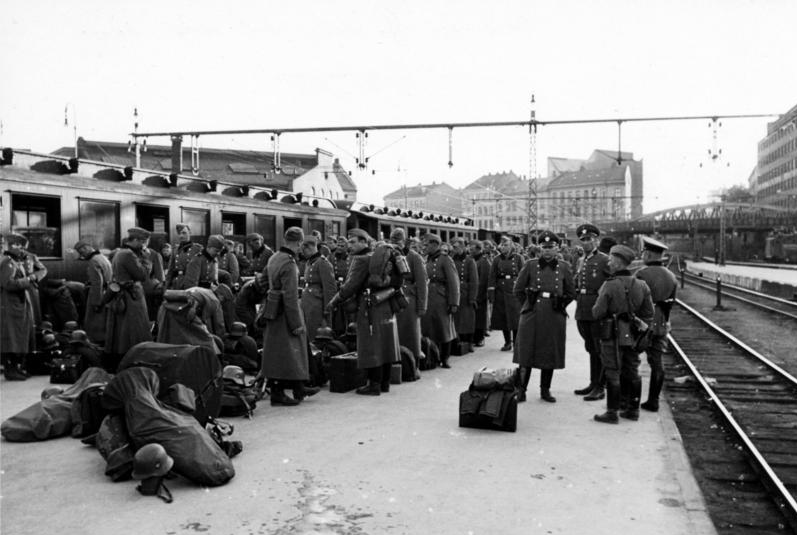 Ankunft d. 9. Pol. Bataillons auf dem Osloer Bahnhof